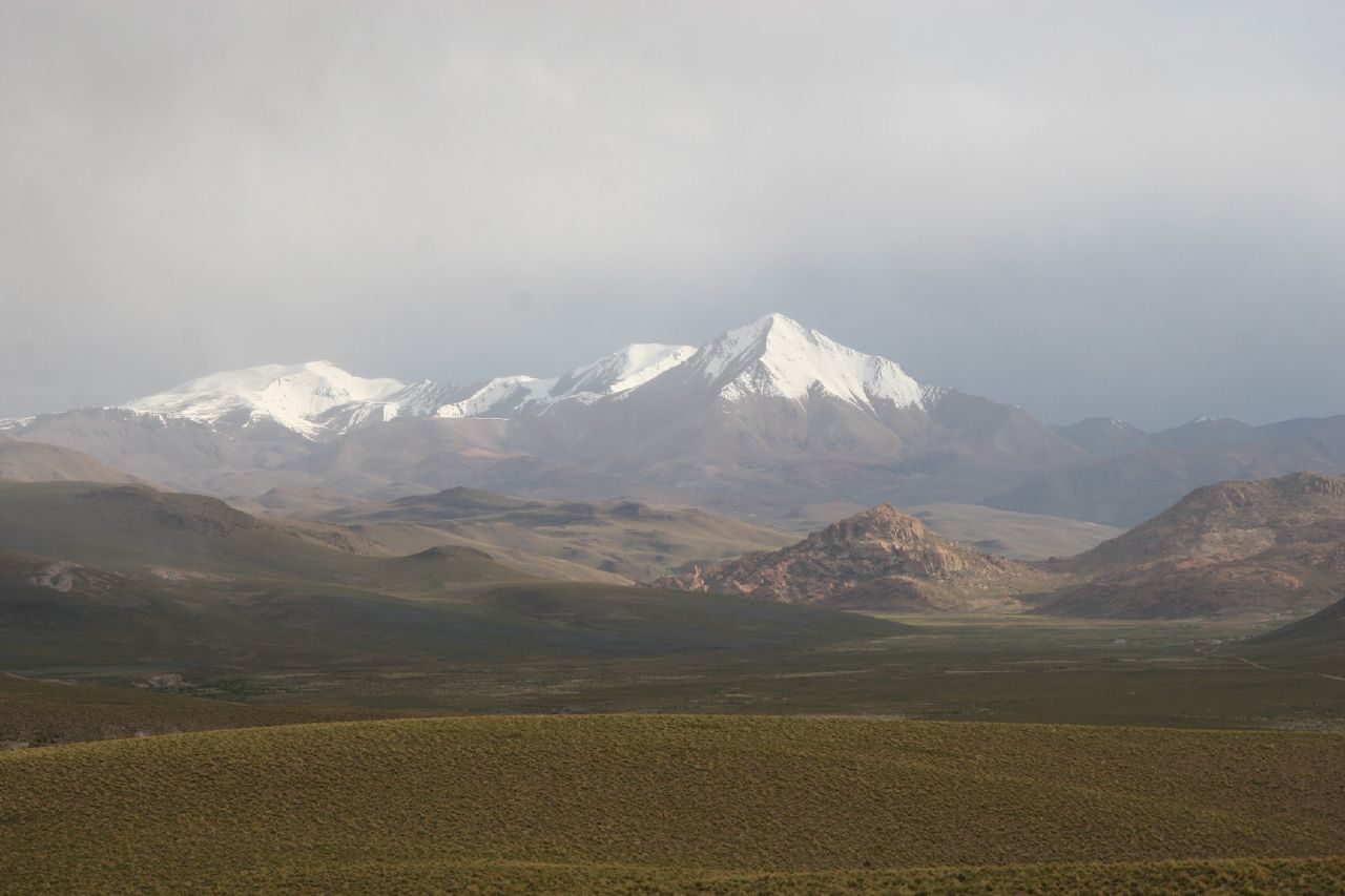 Cerro Lípez, Bolivia